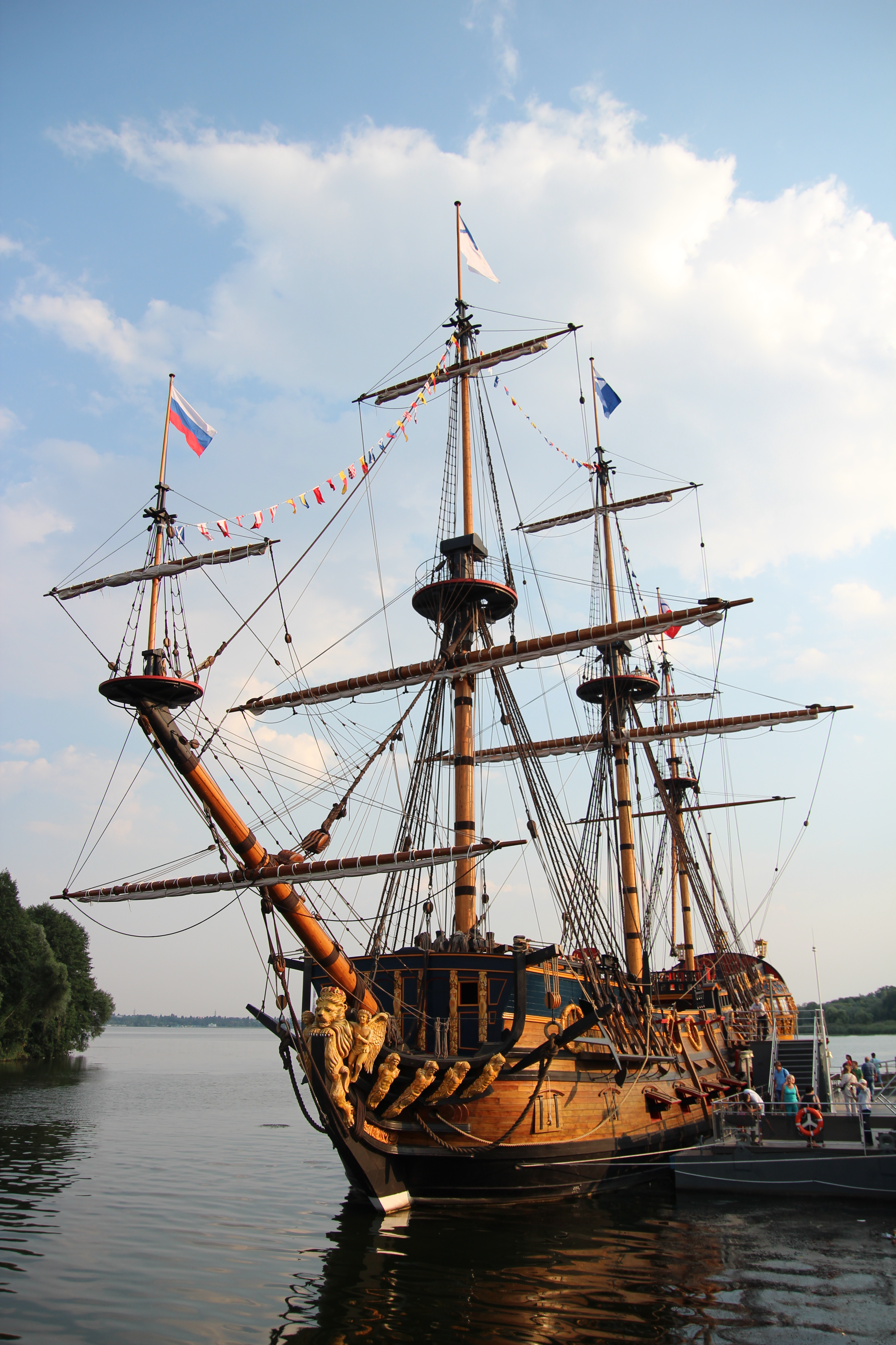 Гото Предестинация у Адмиралтейской площади